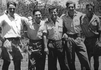 טייסת 101, קיץ 1948